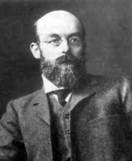 Retrat de William Ernest Johnson (1858-1931), lògic, filòsof i matemàtic anglès